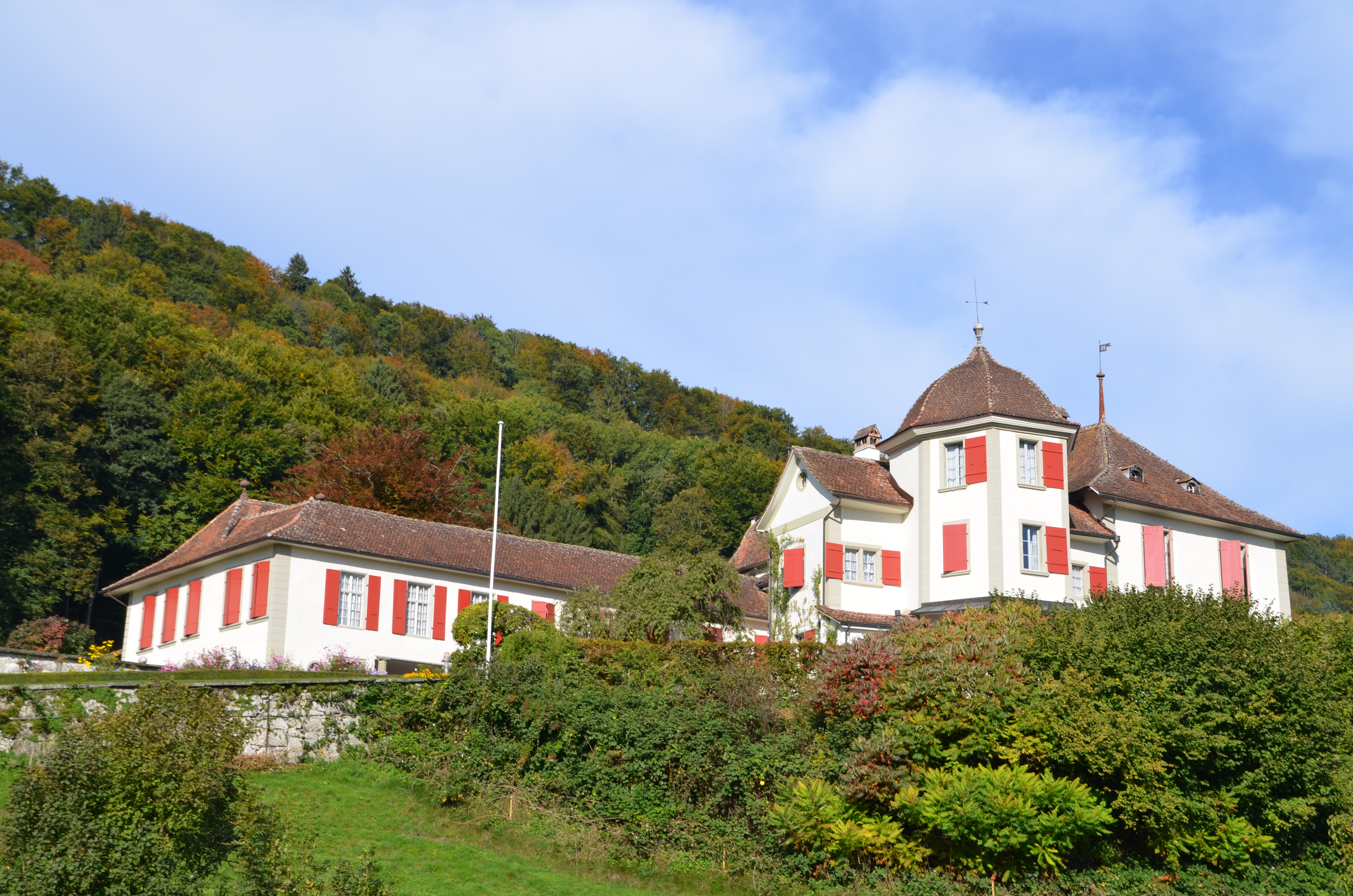 Schloss Toffen von der Hauptstrasse aus